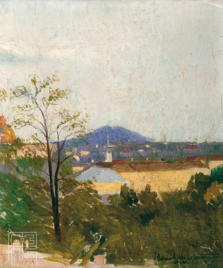 Фотографија слике, Милан Миловановић: Поглед на Авалу.